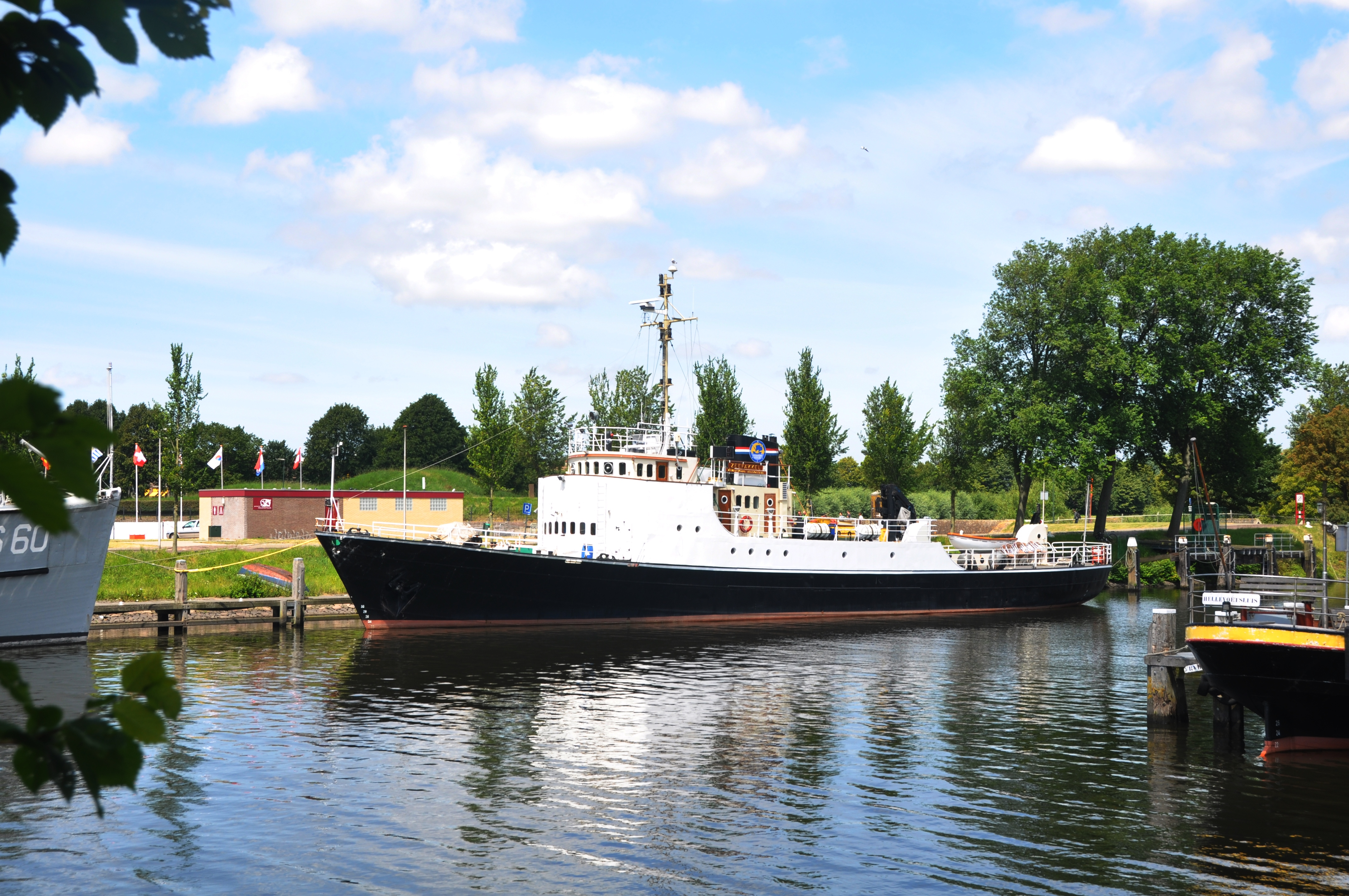 De ZEEFAKKEL voor de wal in Hellevoetsluis.